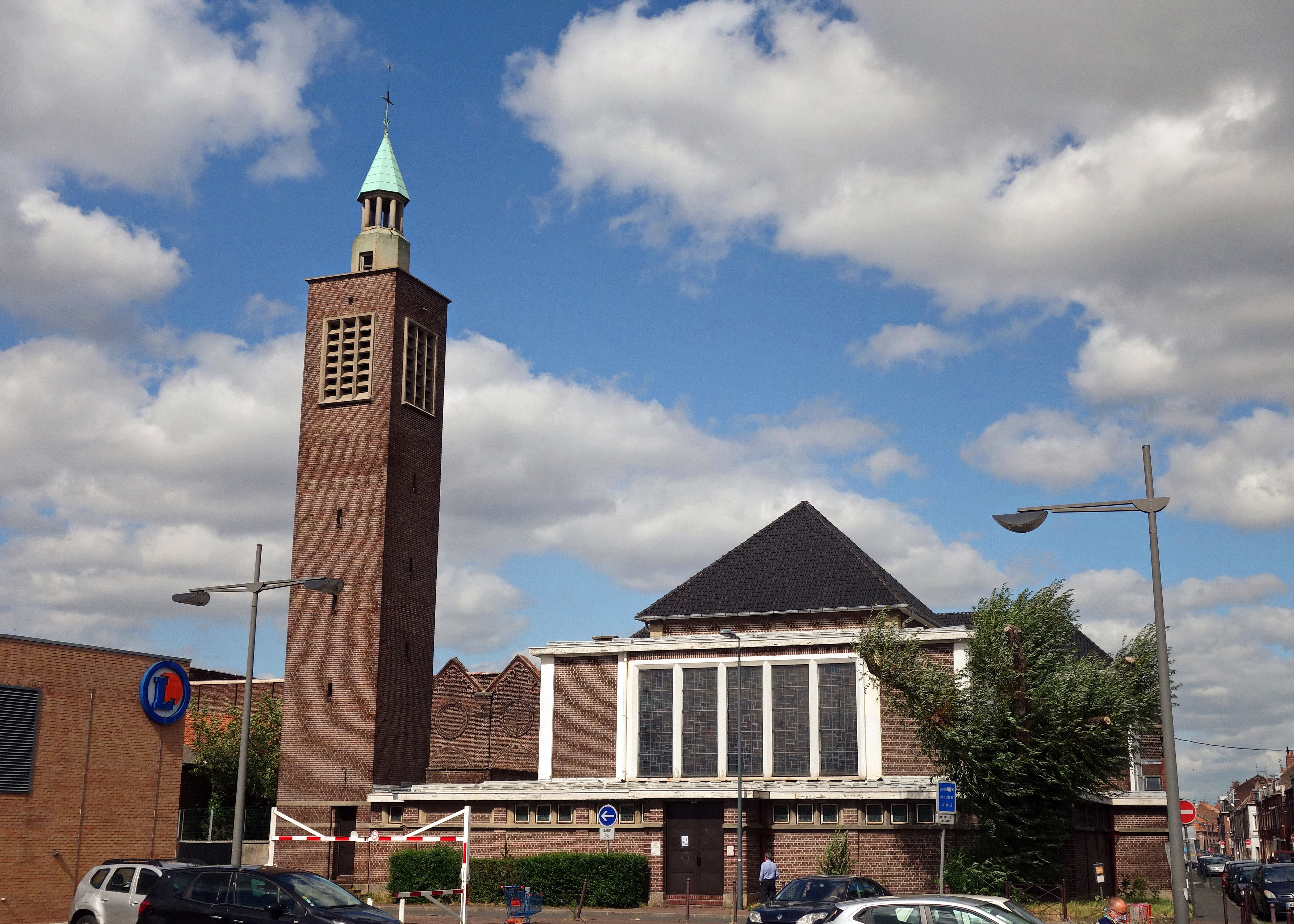 Lille (France - dép. du Nord) - Quartier de Fives — Église du Très-Saint-Sacrement ou du Saint Sacrement, rue Decarnin par l'architecte Gustave Gruson.Construction en plan carréPhase travaux 1950-1953. Matériaux : Gros œuvre : brique, béton armé. - Couverture : tuiles vernissées, zinc. Couverture : quatre pans et terrasse Décor particulier : Christ en bois de tilleul du sculpteur lillois Erny Erny (page 226).